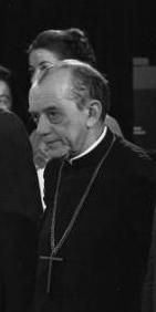 Erste Sitzung des Deutschen Forums für Entwicklungspolitik in der Bonner Beethovenhalle (Gäste: Erzbischof Camara und Bundespräsident Heinemann)